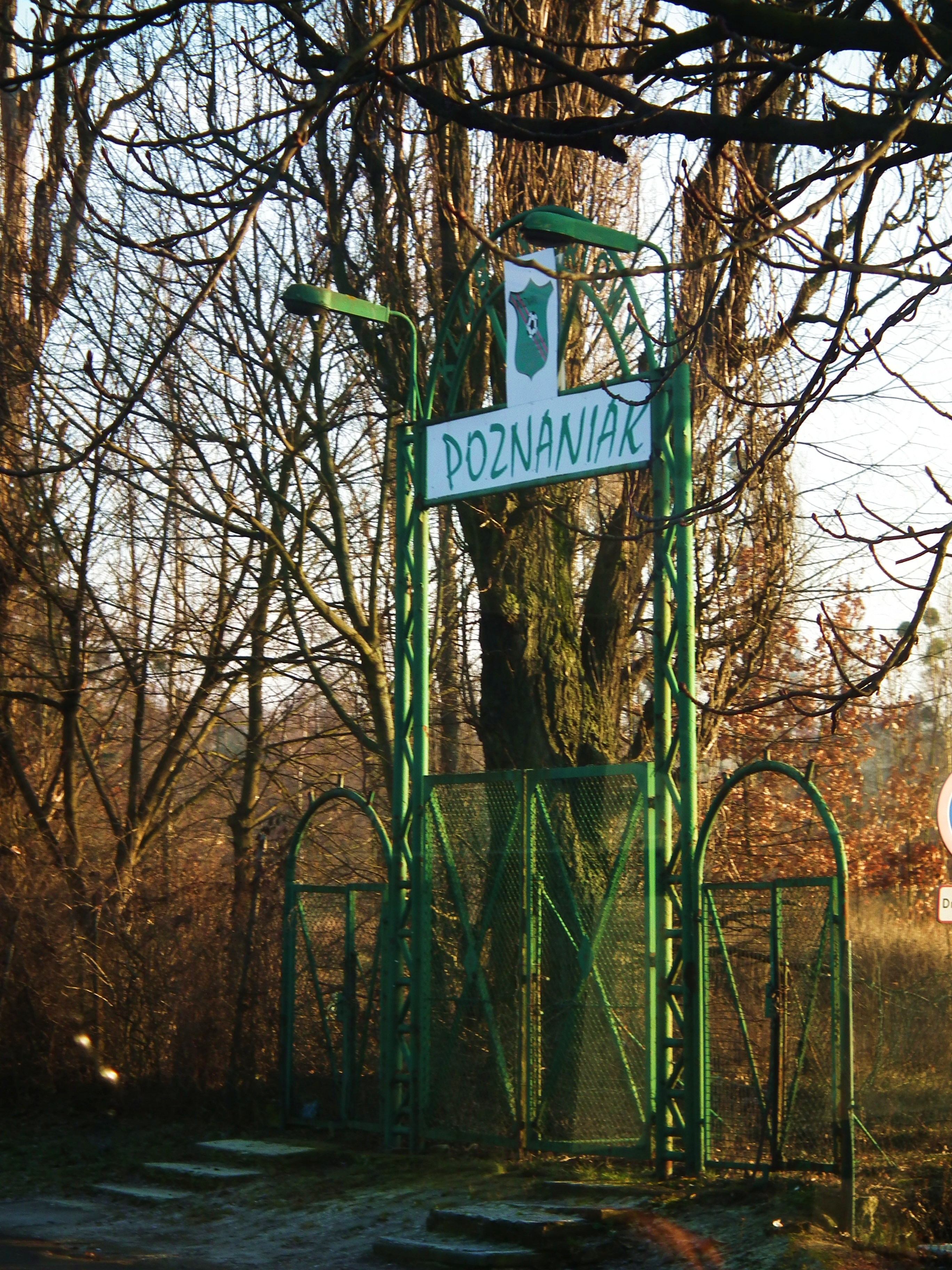 Stadion KS Poznaniak - Poznań, ul. Przybyszewskiego.